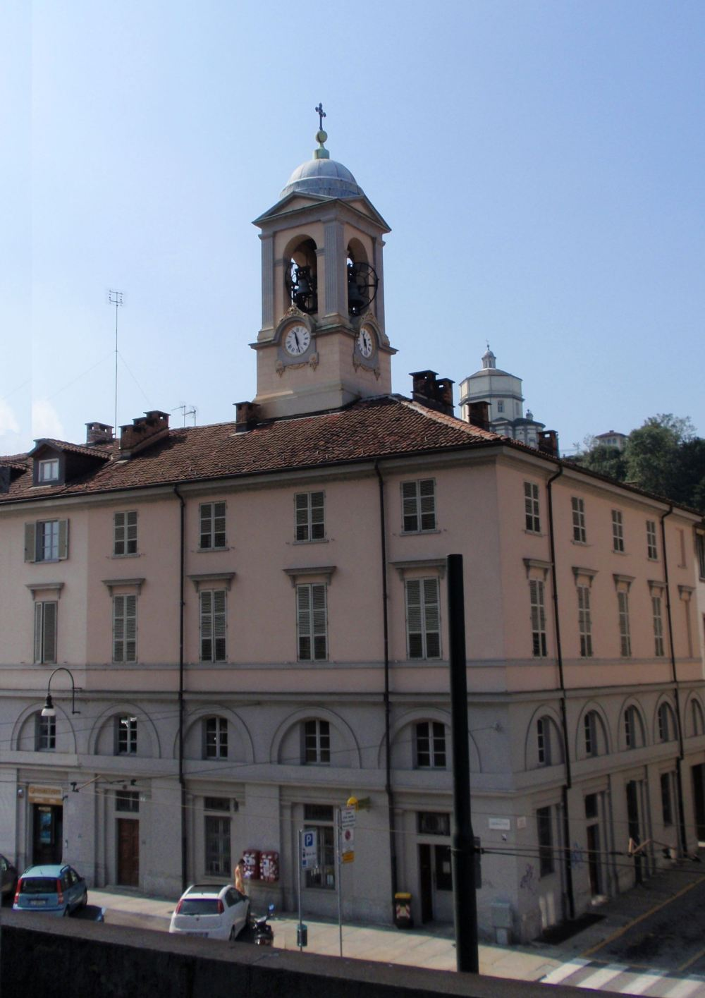 Campanile della chiesa della Gran Madre Borgo Po Torino Italia